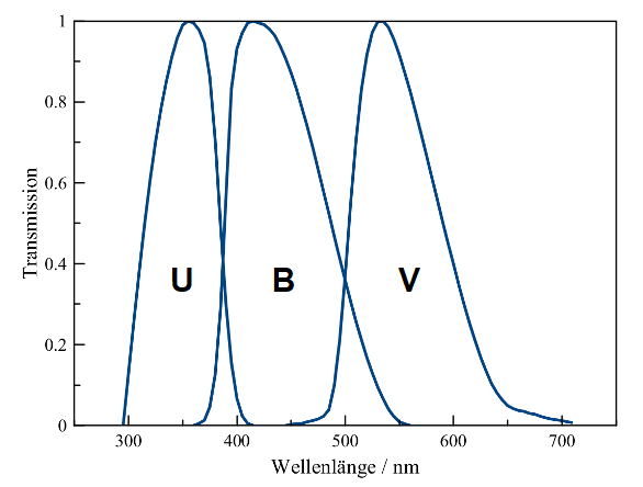 Filter des UBV-Systems nach Johnson H. L. und Morgan W.W., Astrophysical Journal 114, S.522-543, 1951, zur Messung von Sternhelligkeiten und -farben. Dargestellt ist die Durchlässigkeit der Filter als Funktion der Wellenlänge. Die Buchstaben V, B und U stehen für visuell, blau und ultraviolett. Der V-Filter entspricht etwa dem menschlichen Auge, der B-Filter einer klassischen Photoplatte. Der U-Filter repräsentiert das nahe, von der Erdatmosohäre noch durchgelassene Ultraviolett.